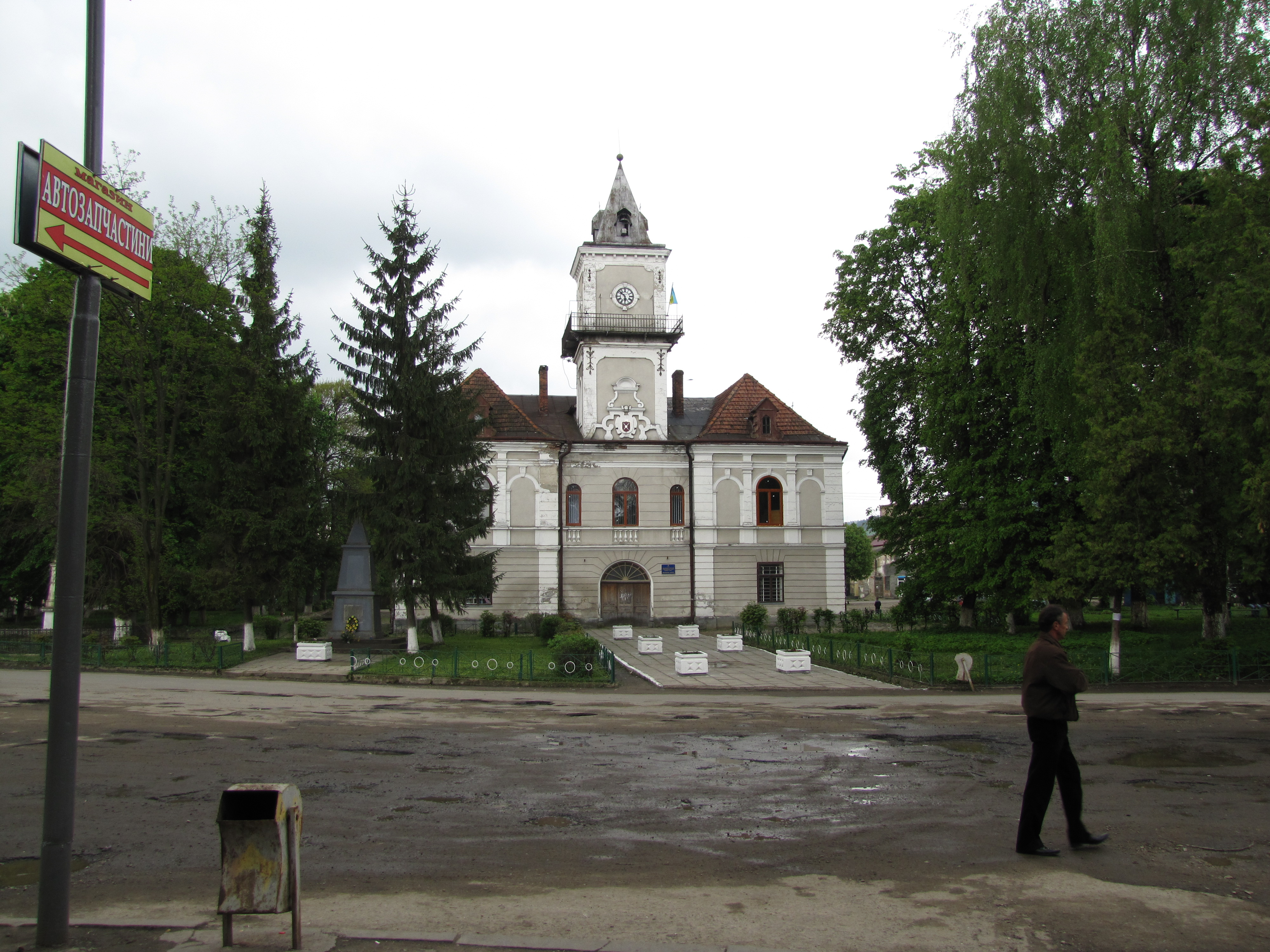 Przedwojenny ratusz w centrum Dobromila